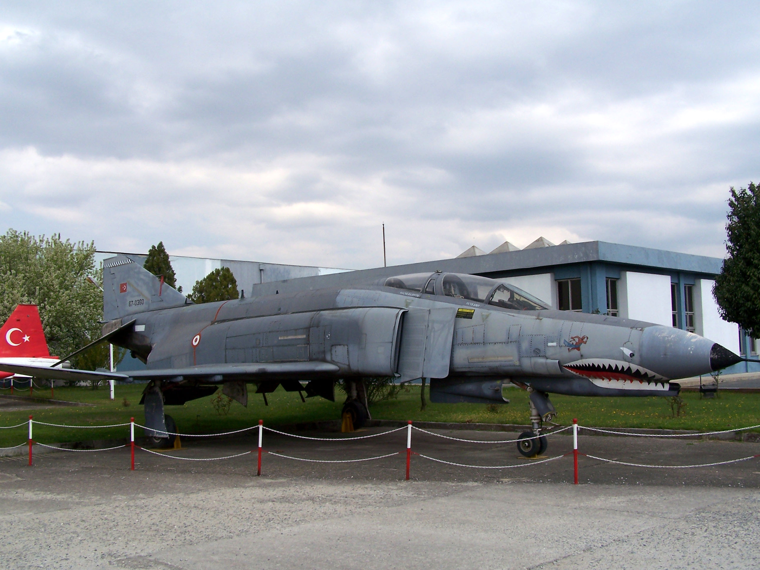 F-4E Phantom in Istanbul Aviation Museum (İstanbul Havacılık Müzesi)